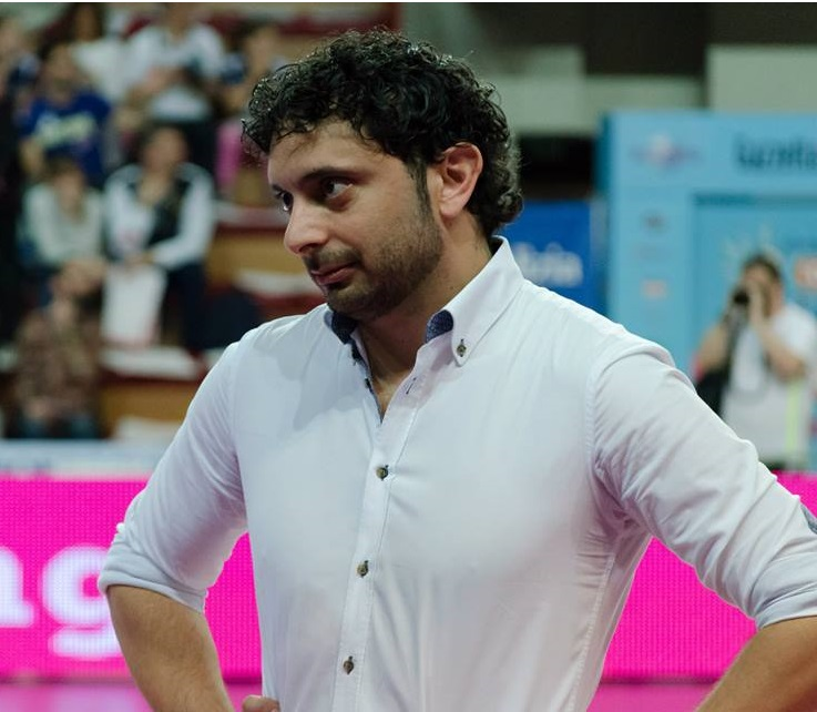 Allenatore di pallavolo italiano